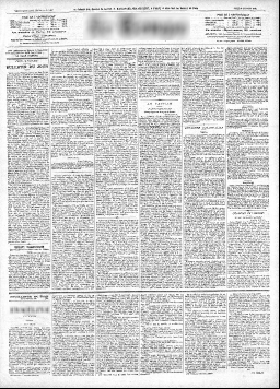 La une d'un quotidien à la fin du 19e siècle